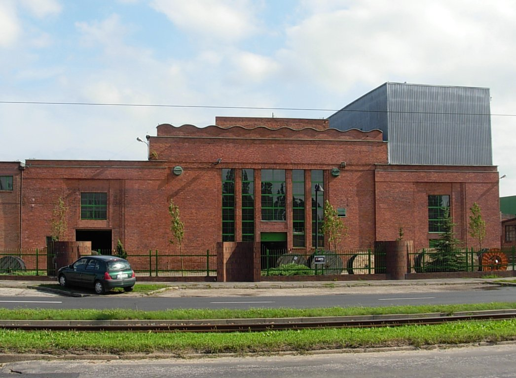 Telefonika Kable Bydgoszcz